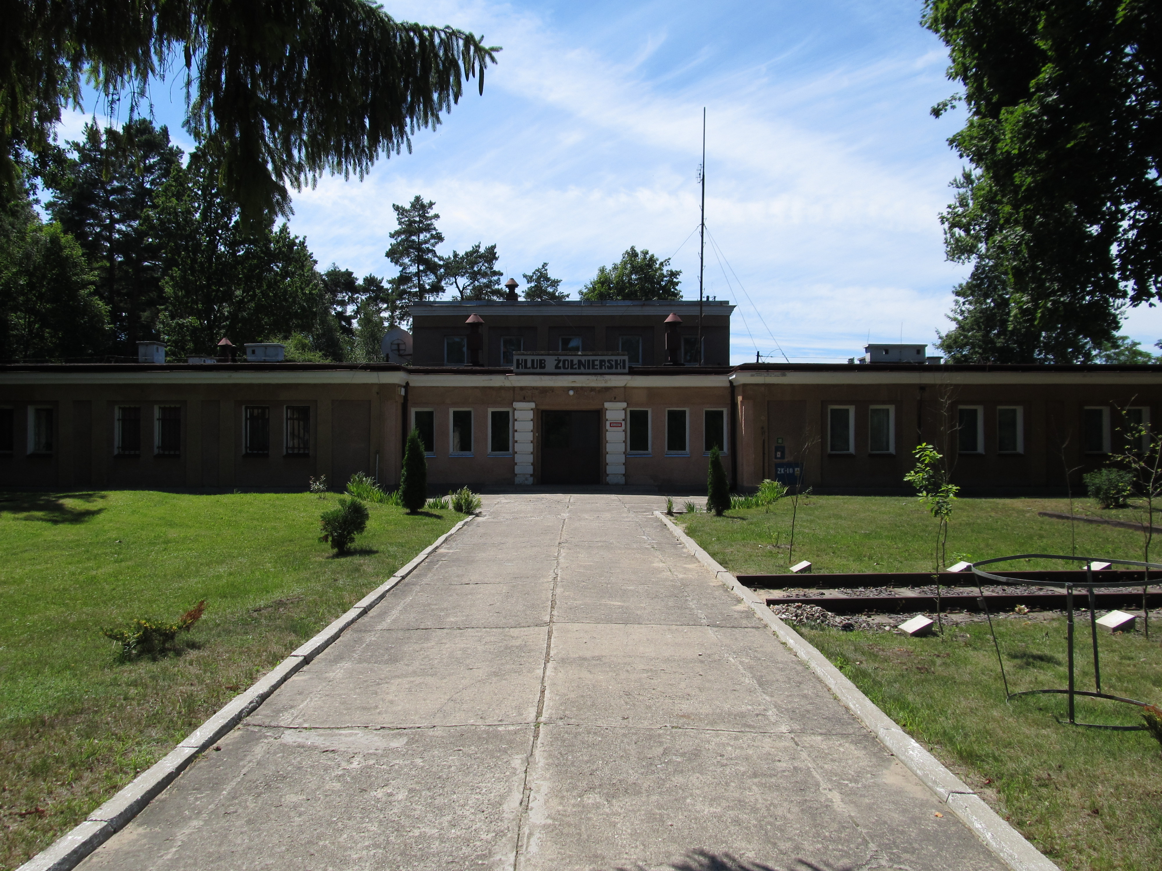 zespół Twierdzy Osowiec Fort I (Góra Skorbielewa), mur., 1882-1892 Fort II (pozycja zarzeczna), mur., 1882-1892 Fort III, mur., 1882-1892 Fort IV, mur., 1882-1892 Osowiec-Twierdza (w rejestrze: Osowiec), Goniądz 10.1998.